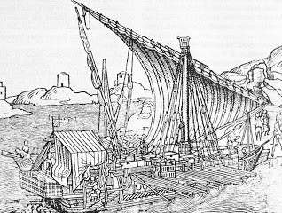 Hadigálya Mátyás király idejéből. 1486-ban készült fametszet (forrás alapján). Navy of Hungary, woodcat by Bernhard von Breydenbach, 1486 works